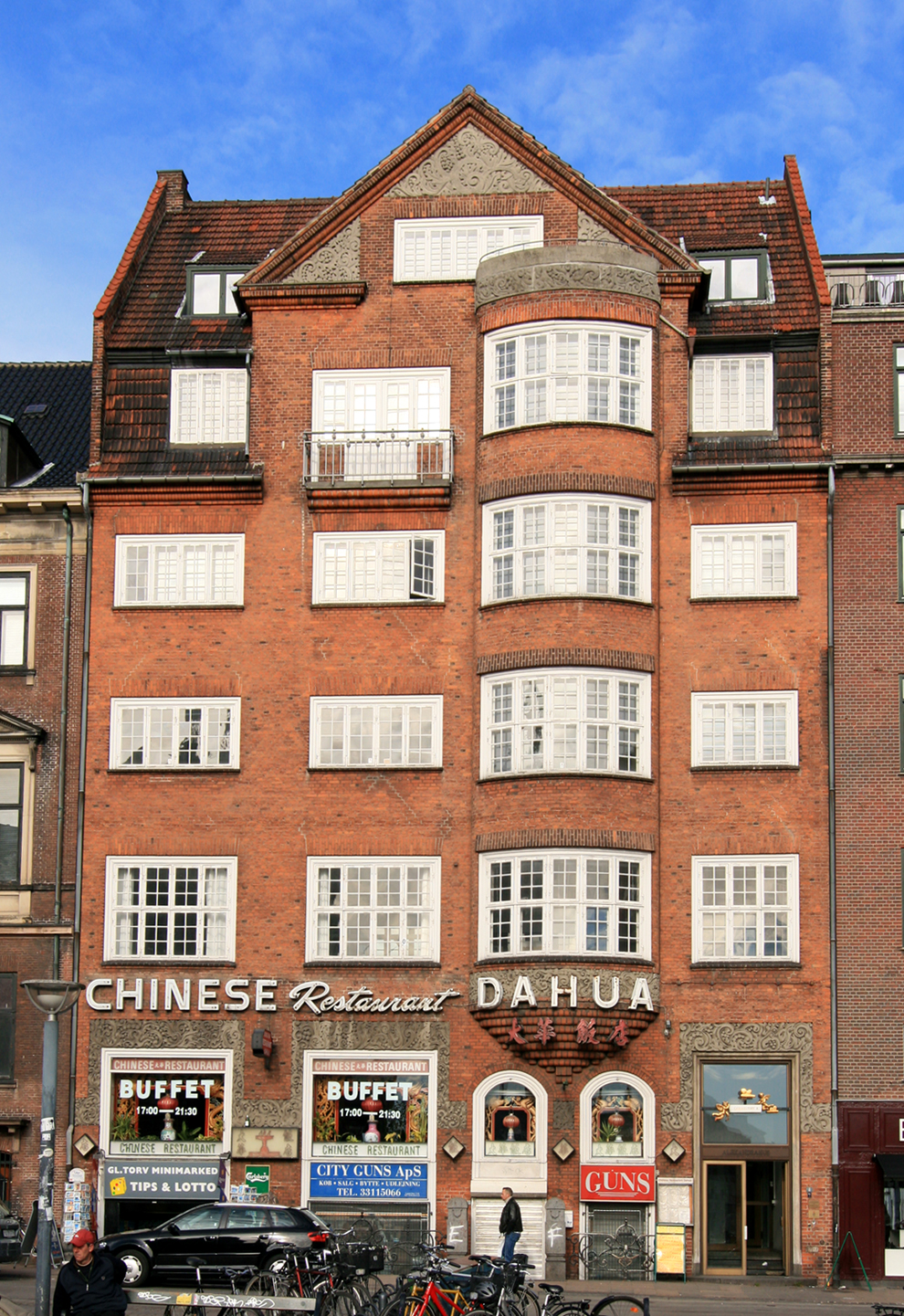 Gammeltorv 8, København. Bygget 1905-1906. Arkitekt: Ulrik Plesner. Ornamentik: Thorvald Bindesbøll.